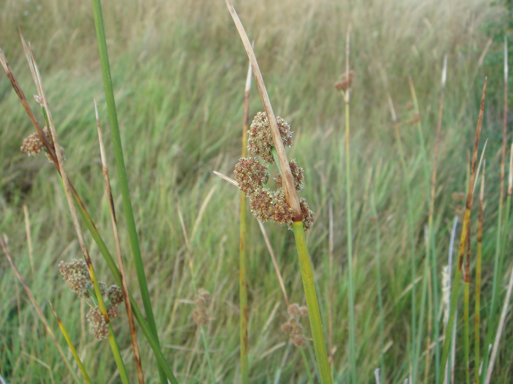 Scirpoides holoschoenus, La Torre (Ávila), España.